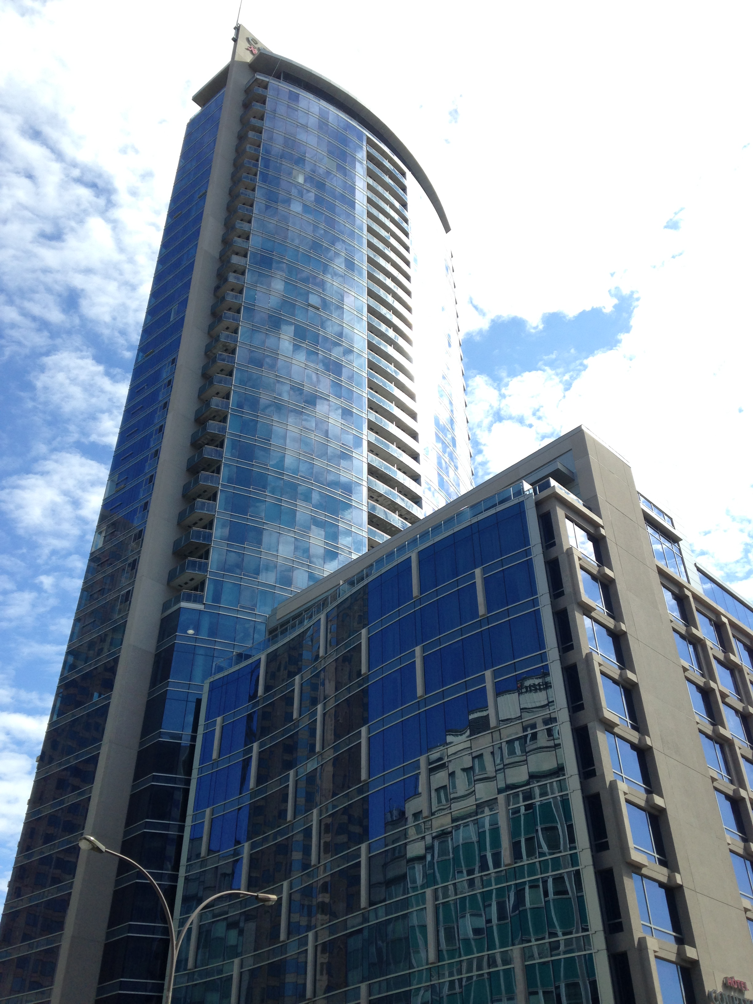 Le V